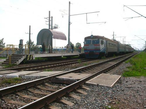 Залізнична платформа Чубинський